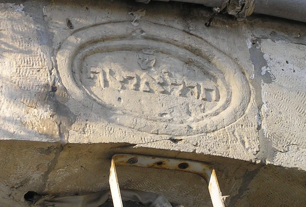 כתובת המתארת את שנת הקמת המבנה שהיום משמש כבית הכנסת של מוצא